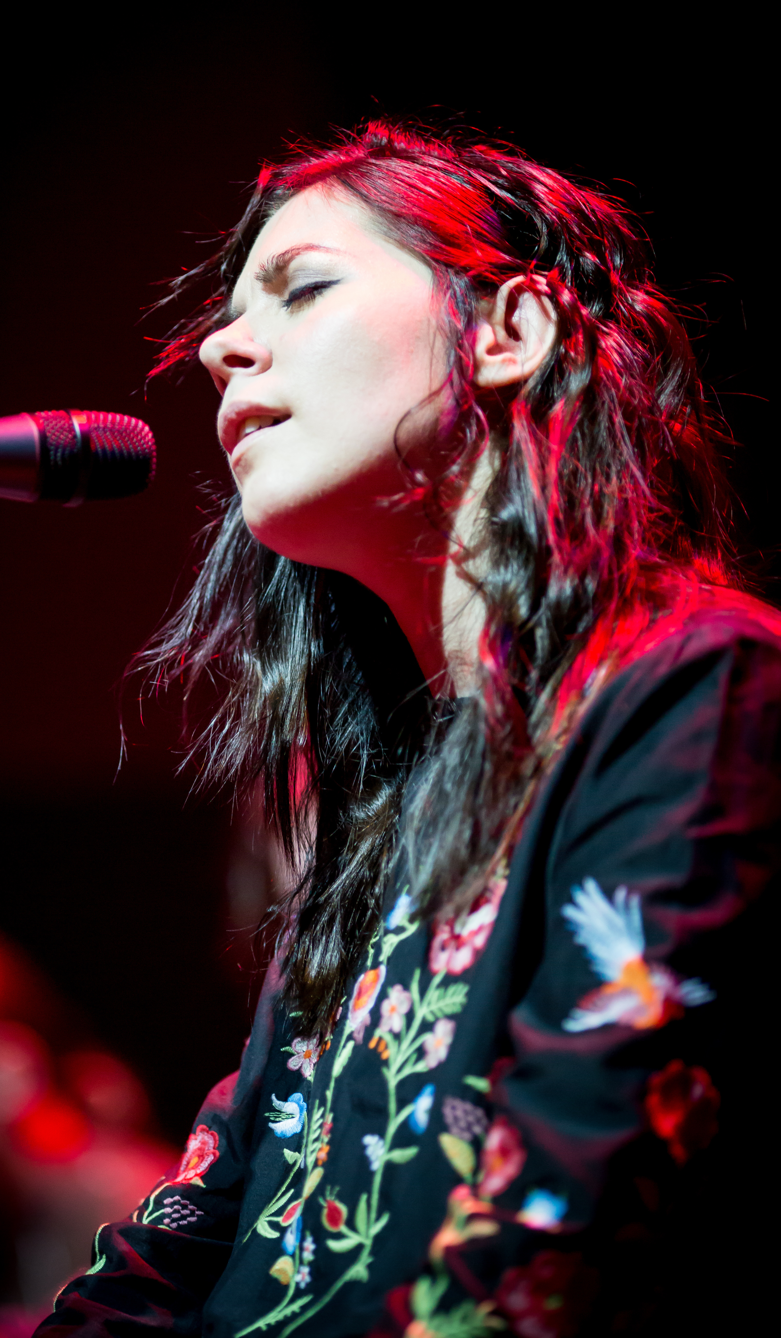 Яна Вева, концерт Theodor Bastard 28 октября 2016 в ЦДХ, фото Алексея Машутикова